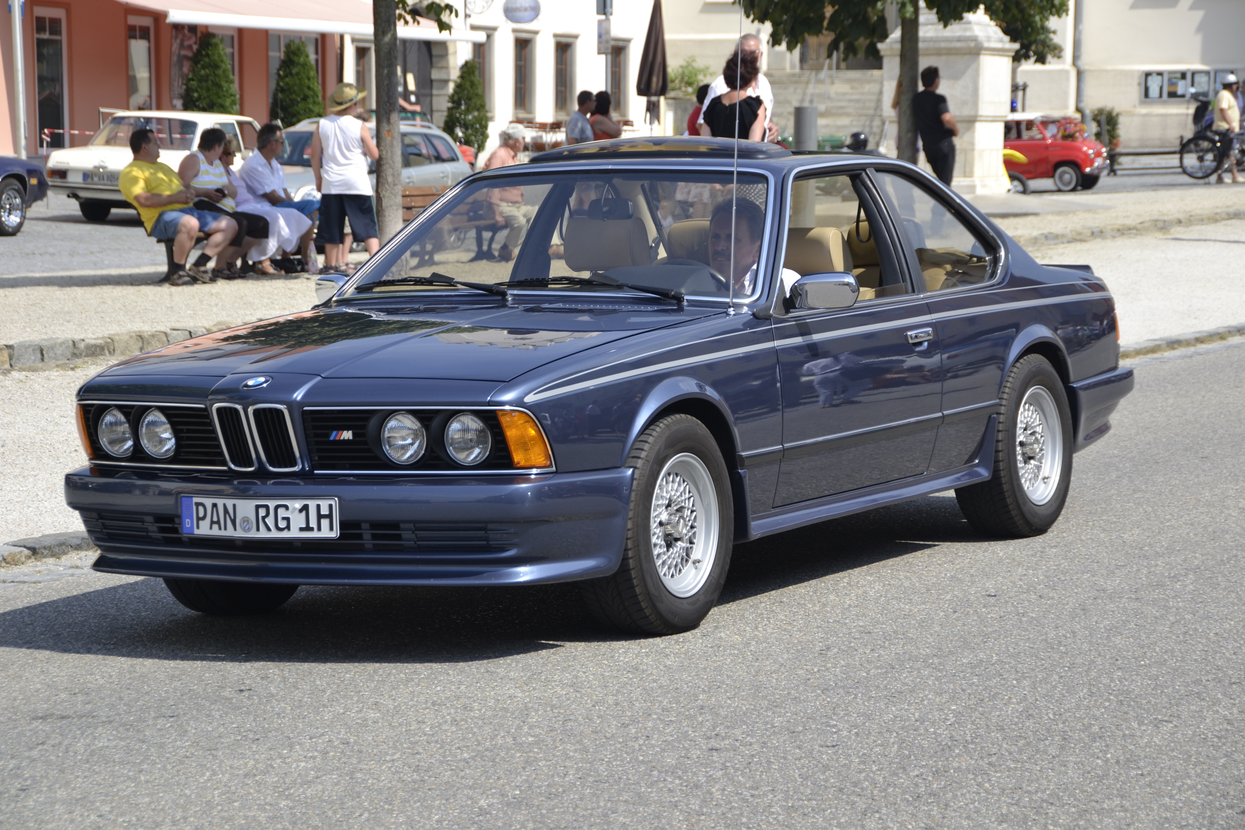 Der Oldtimerumzug in Aidenbach (Bayern) im August 2013.